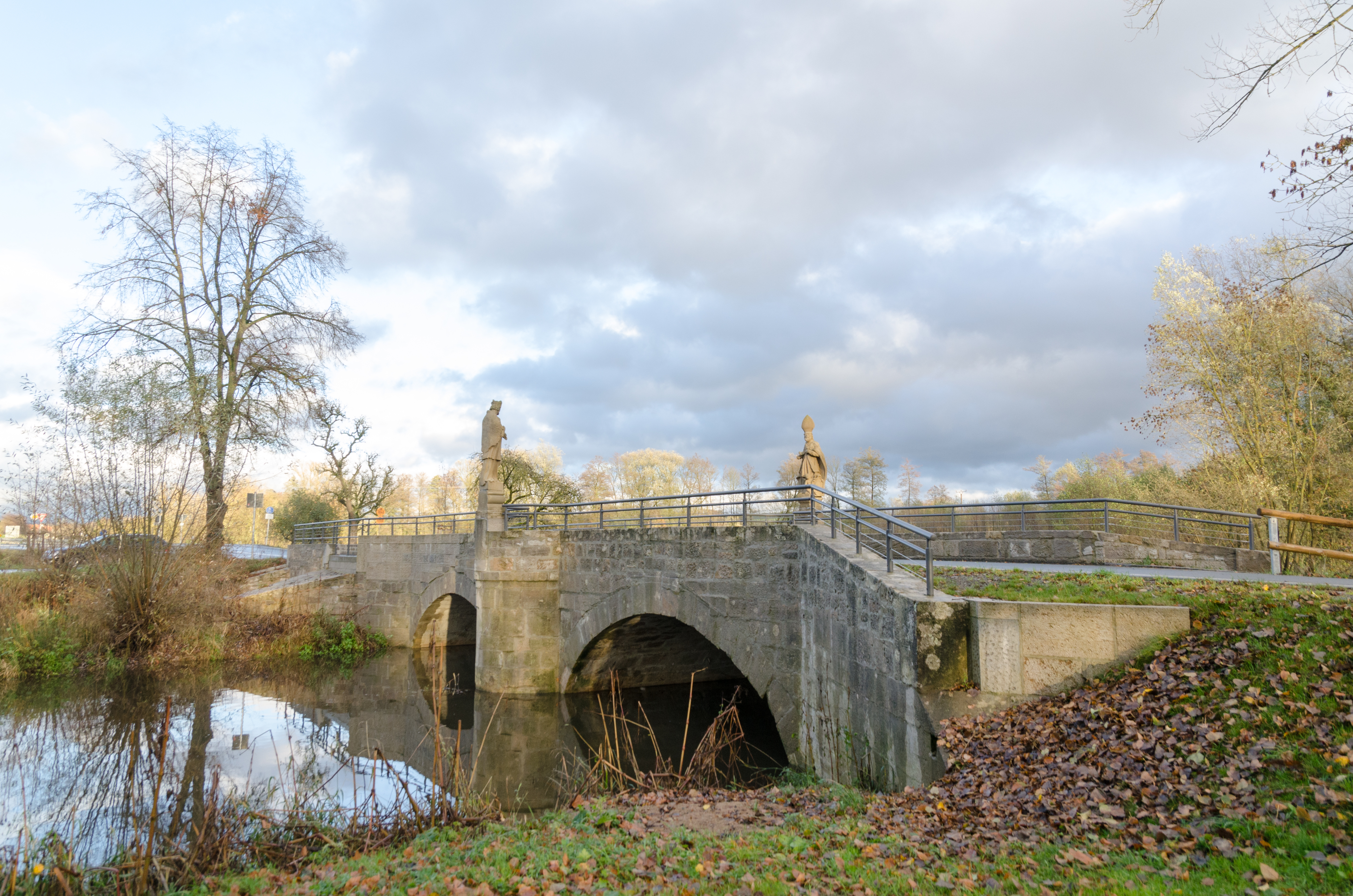 Mittelstreu, Streubrücke, D-6-73-151-56